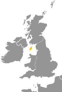 Idioma manés